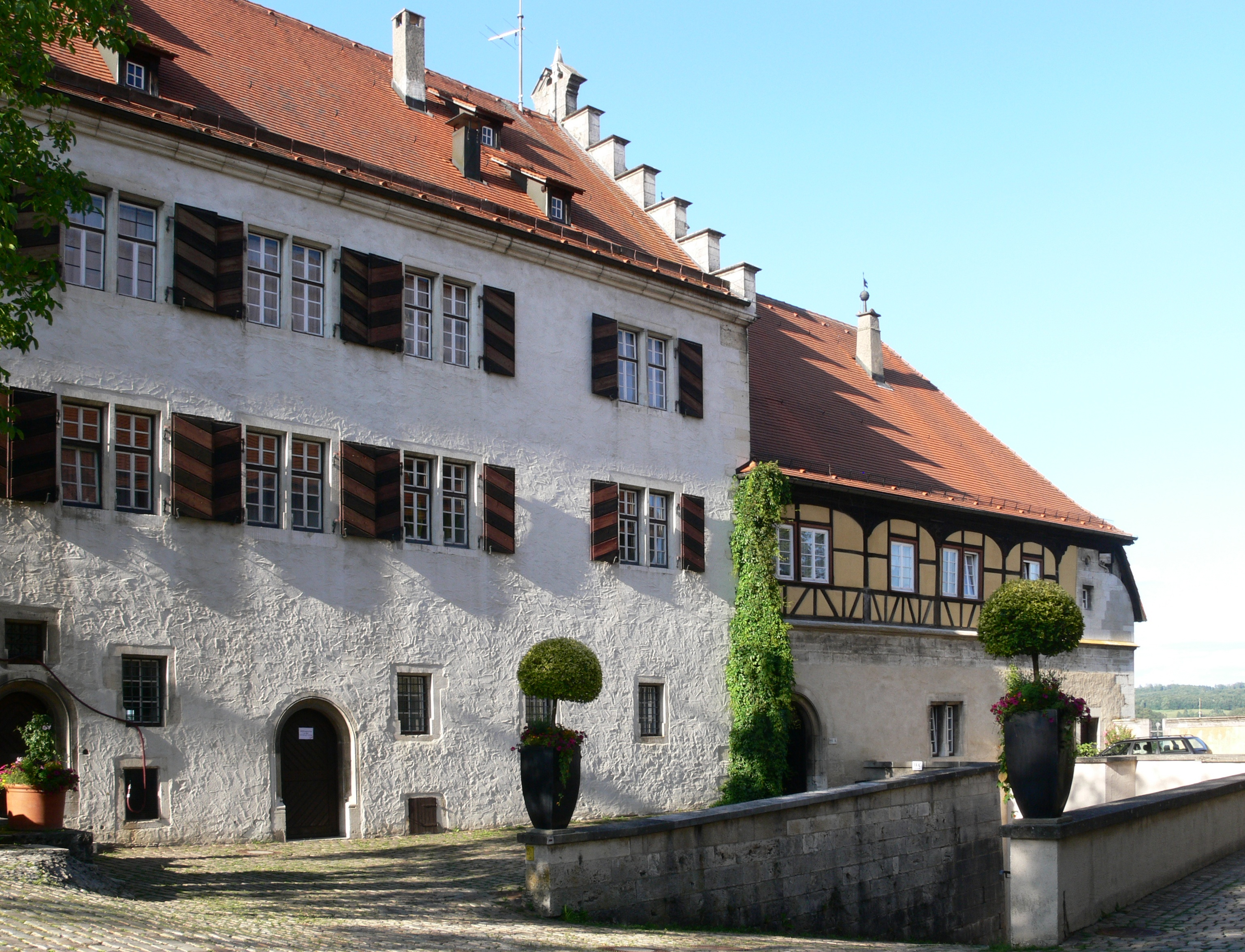 Schloss Hellenstein, Heidenheim an der Brenz Innenhof